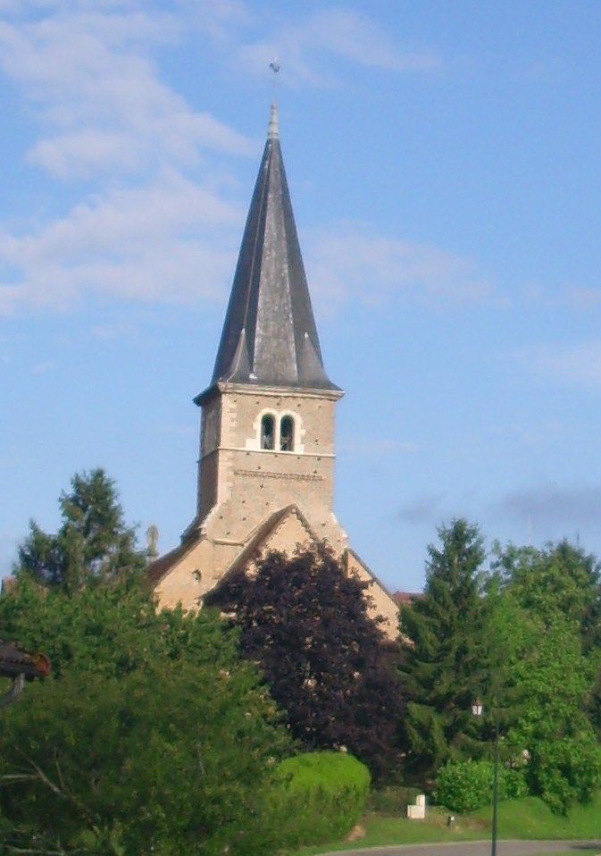 Eglise de Montpont-en-Bresse (71)